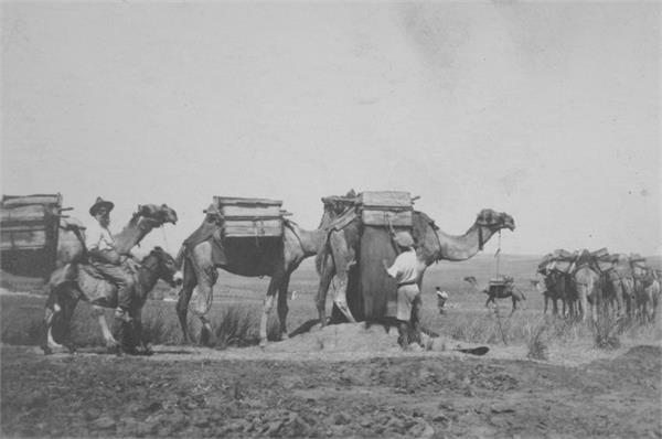 הרצליה - שיירת גמלים